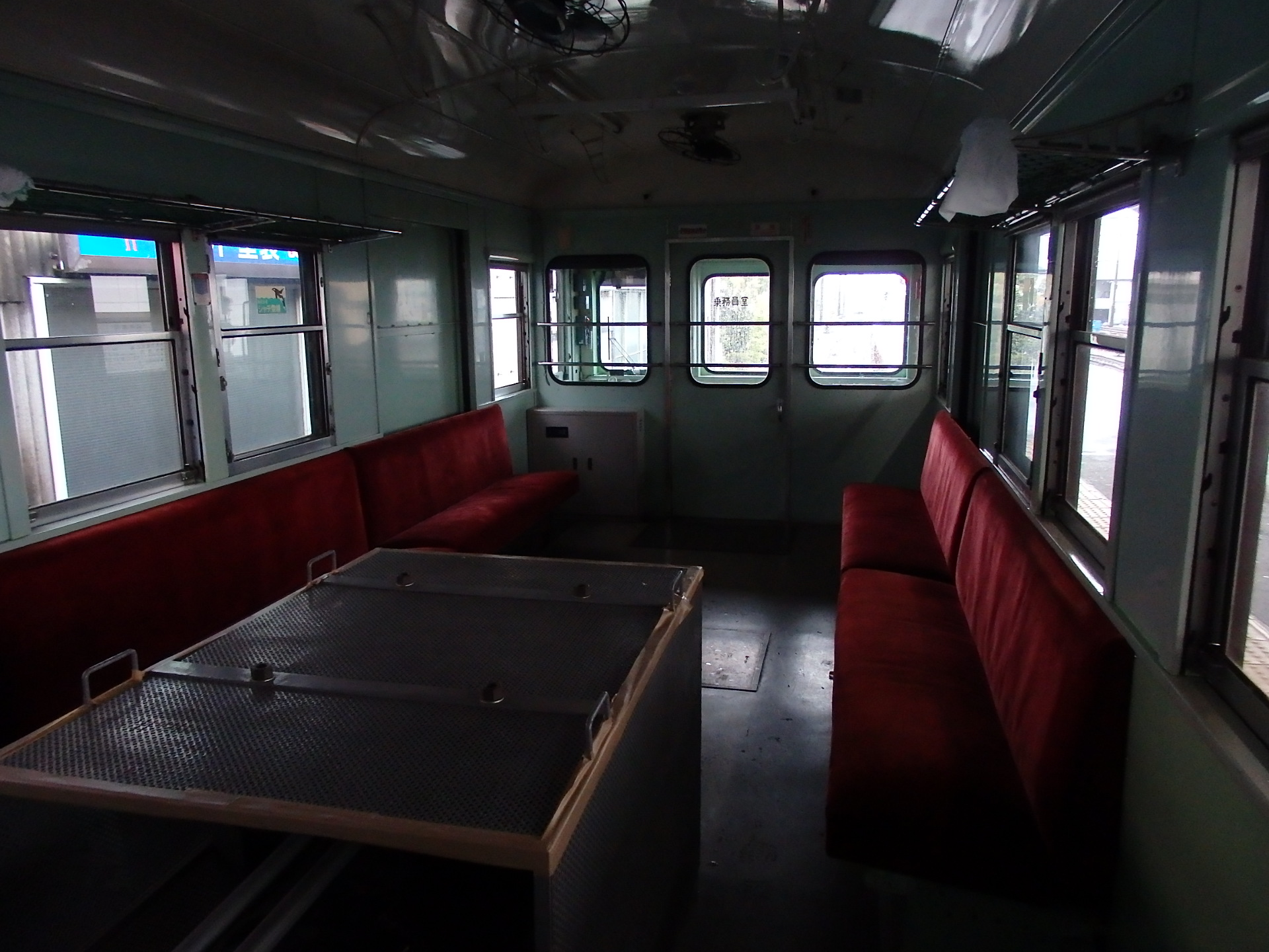 コデ165形電車の車内（大雄山駅での茶色塗装お披露目会にて撮影）